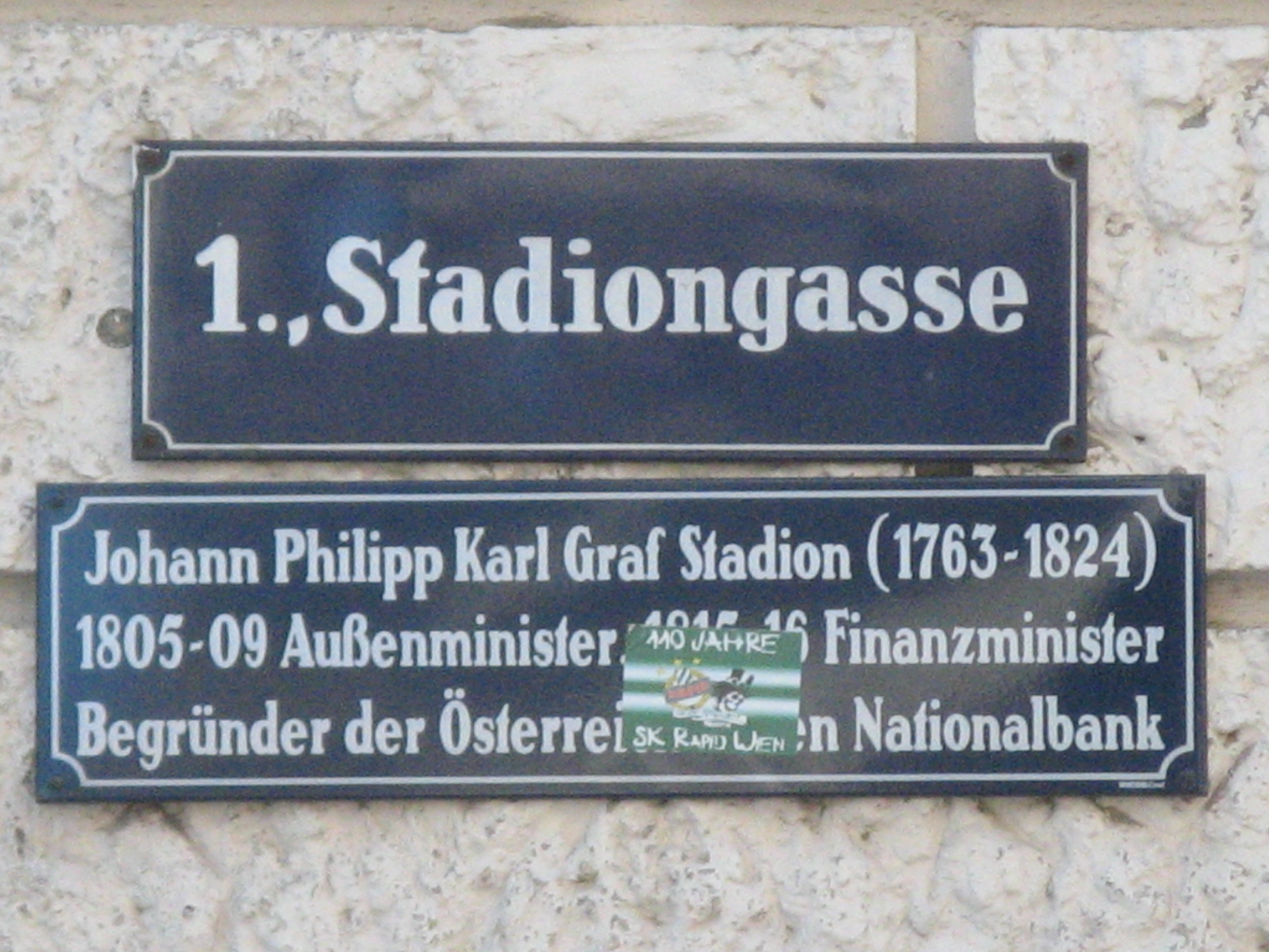 Straßentafel mit Zusatzschild, Stadiongasse, Wien-Innere Stadt